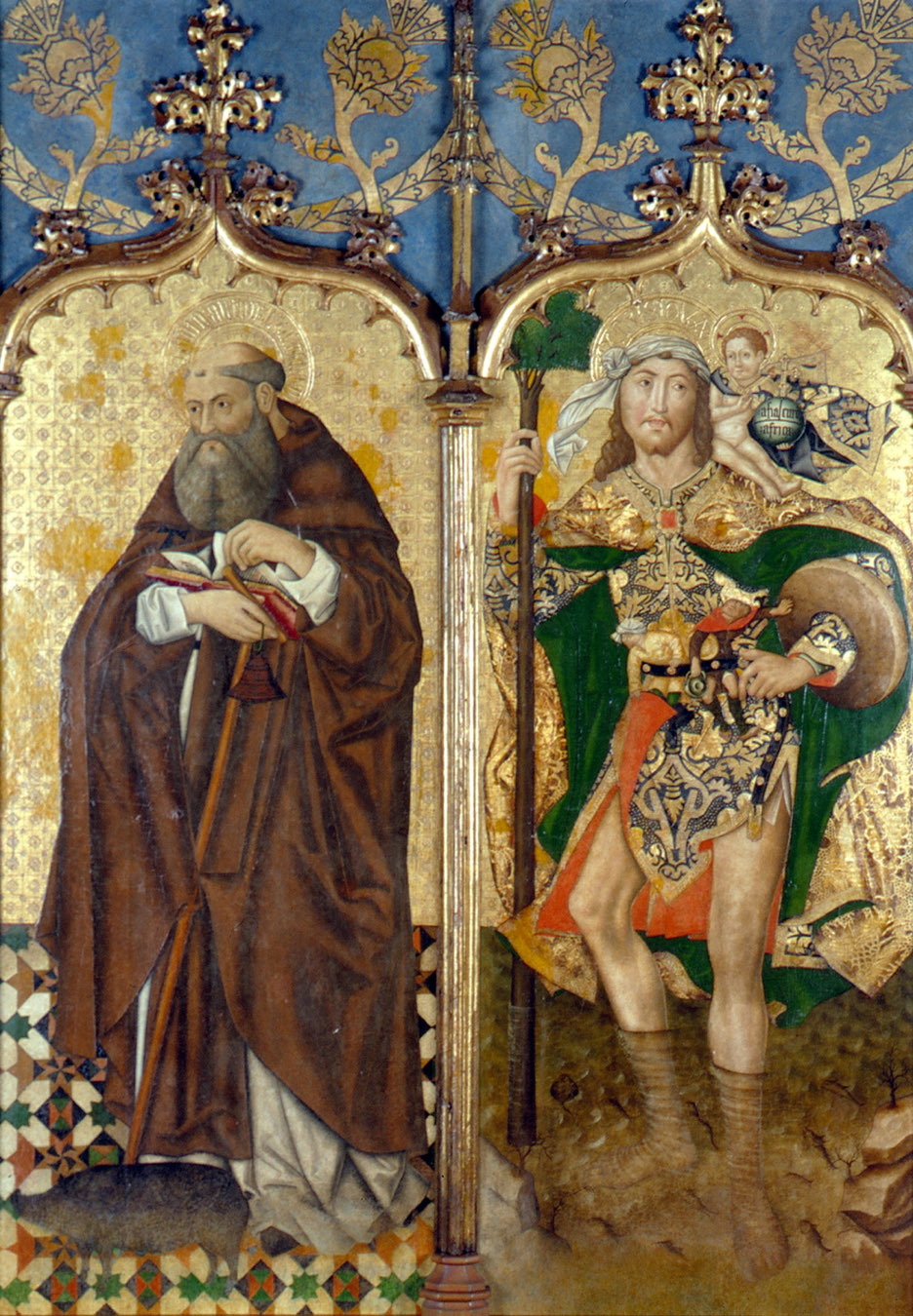 La obra representa a San Antonio Abad y a San Cristóbal, y proceden del convento de San Benito de Calatrava.